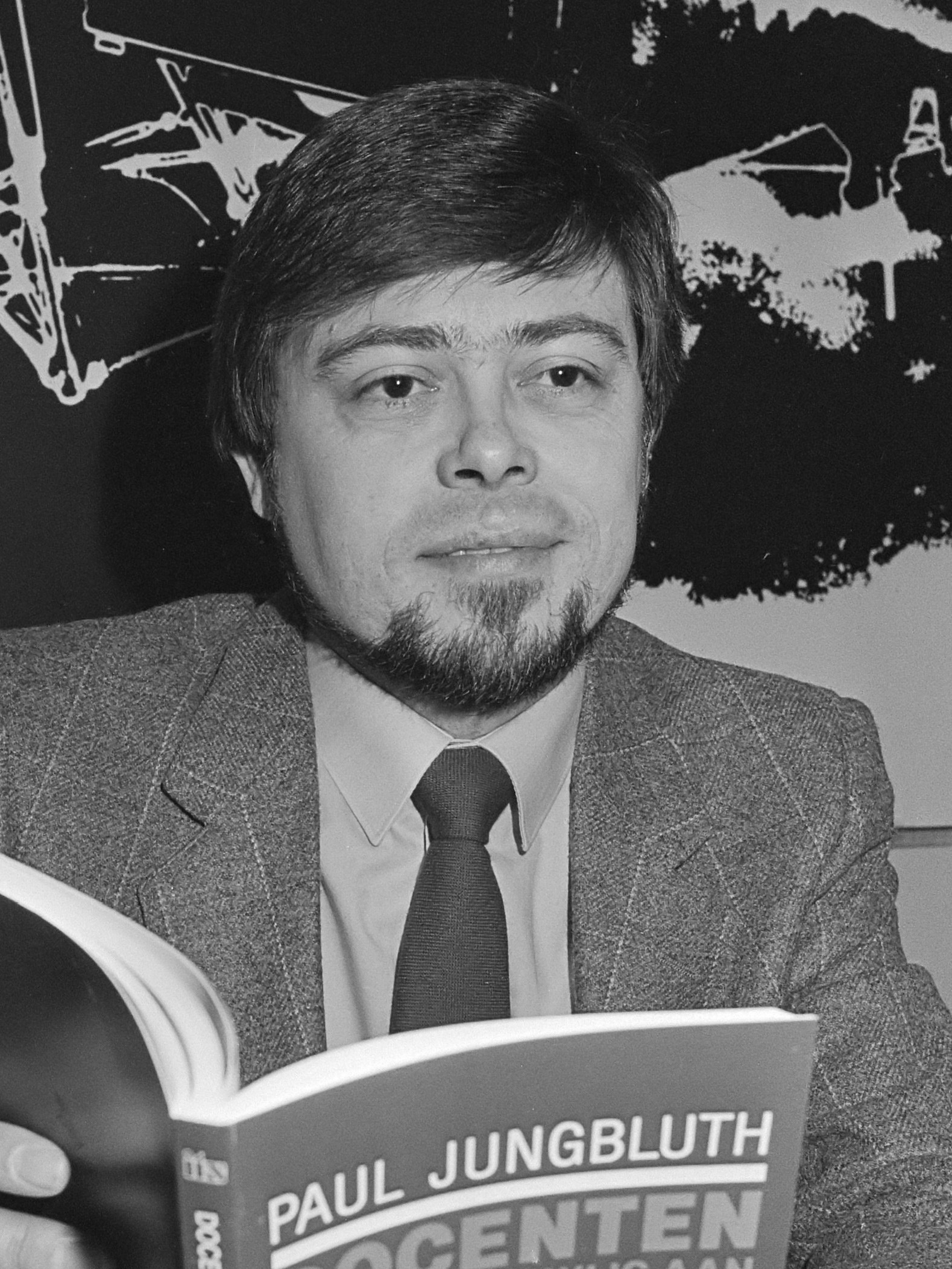 Presentatie boek "Docenten over onderwijs aan meisjes" Paul Jungbluth van de katholieke universiteit in Nijmegen 24 februari 1982